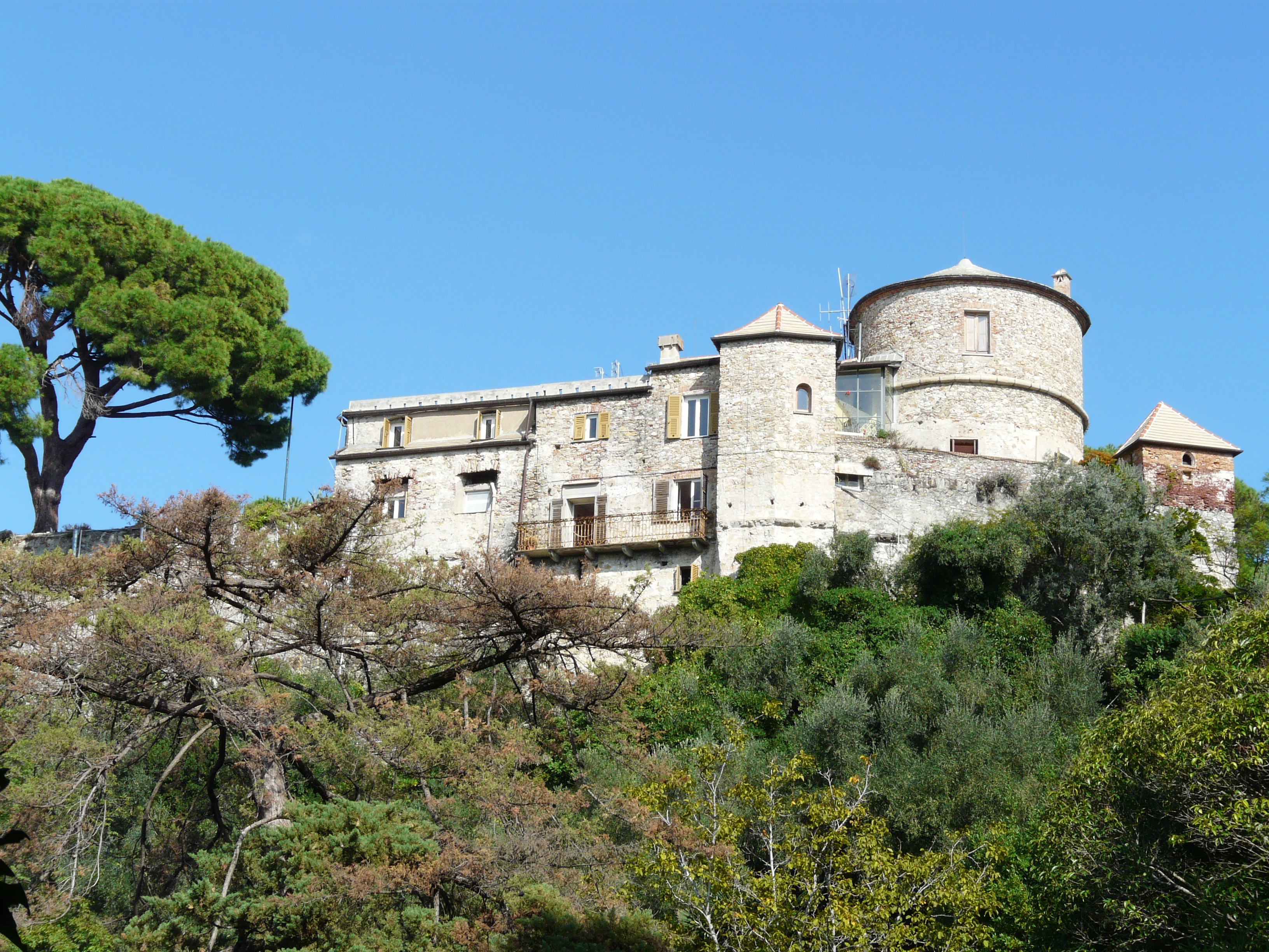 Castello Brown, Portofino, Liguria, Italia